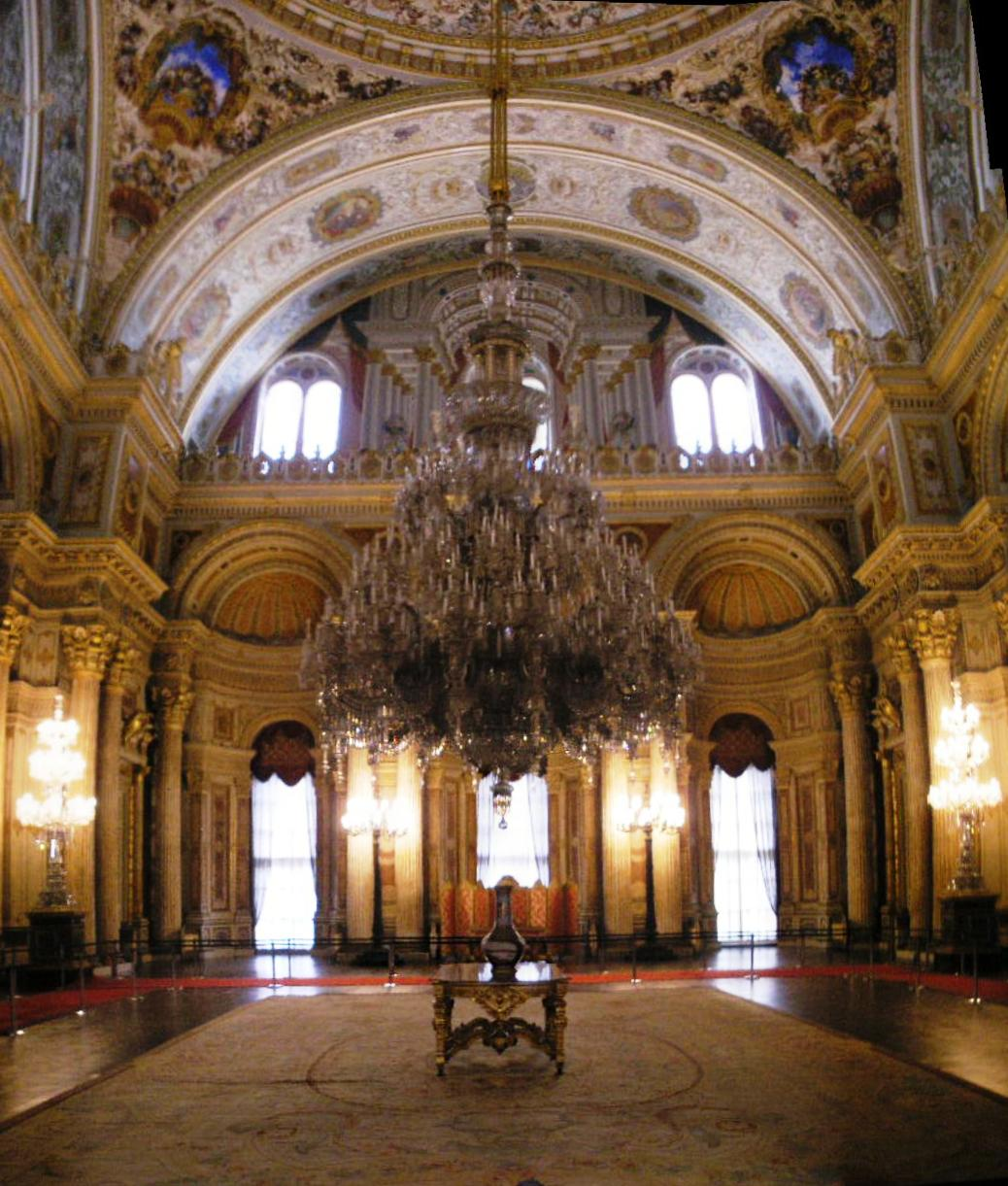 Ceremonial Hall (Muayede Salonu) in Dolmabahçe Palace